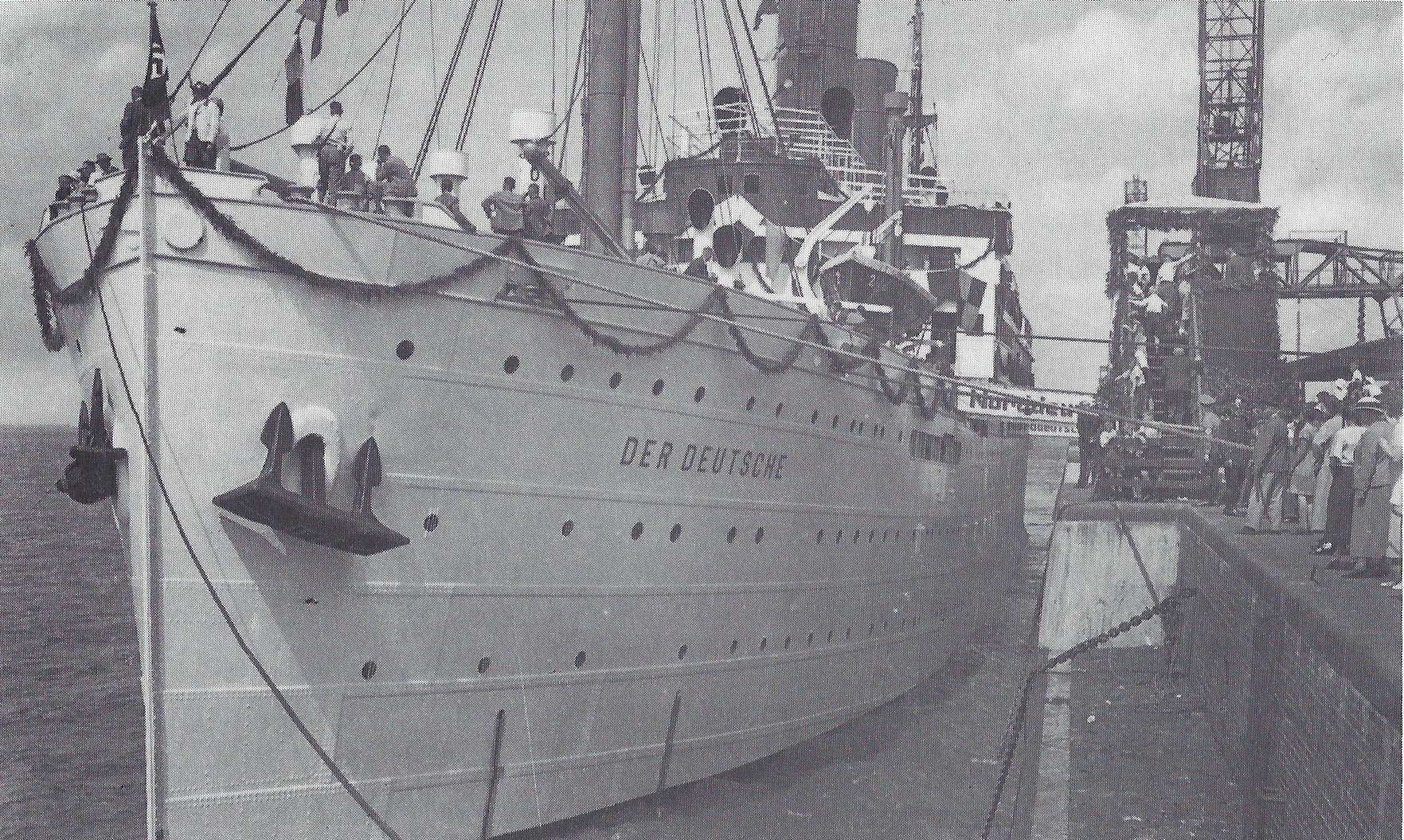 Postkarte von Der Deutsche, Schiff der Deutschen Arbeitsfront an der Pier.